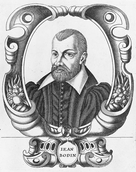 Jean Bodin, portrait gravé destiné à illustrer les Illustres d'Anjou de Claude Ménard (avant 1620)